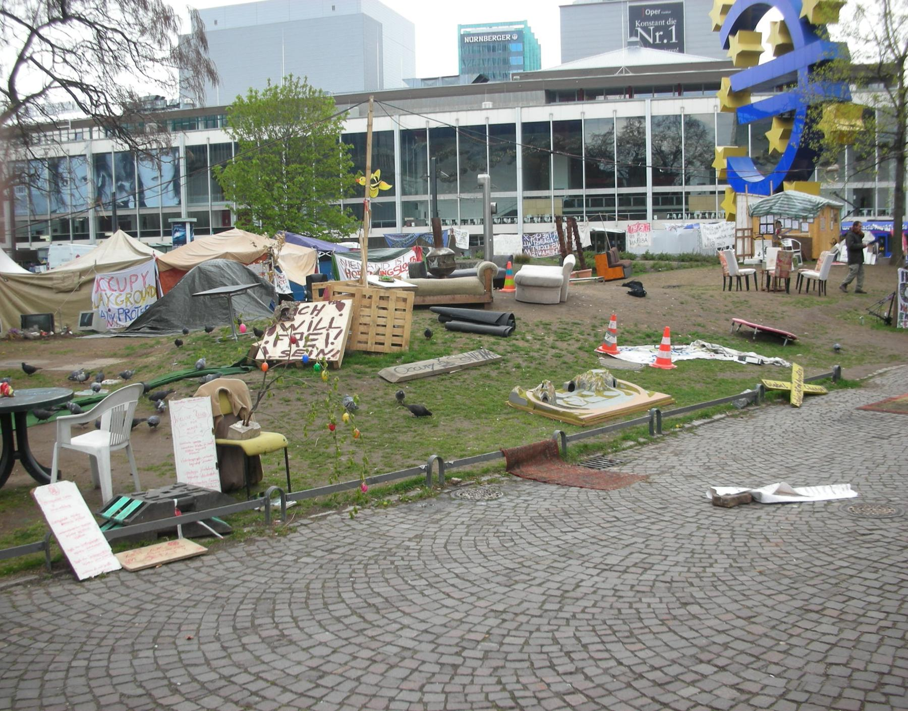 Occupy-Frankfurt Park